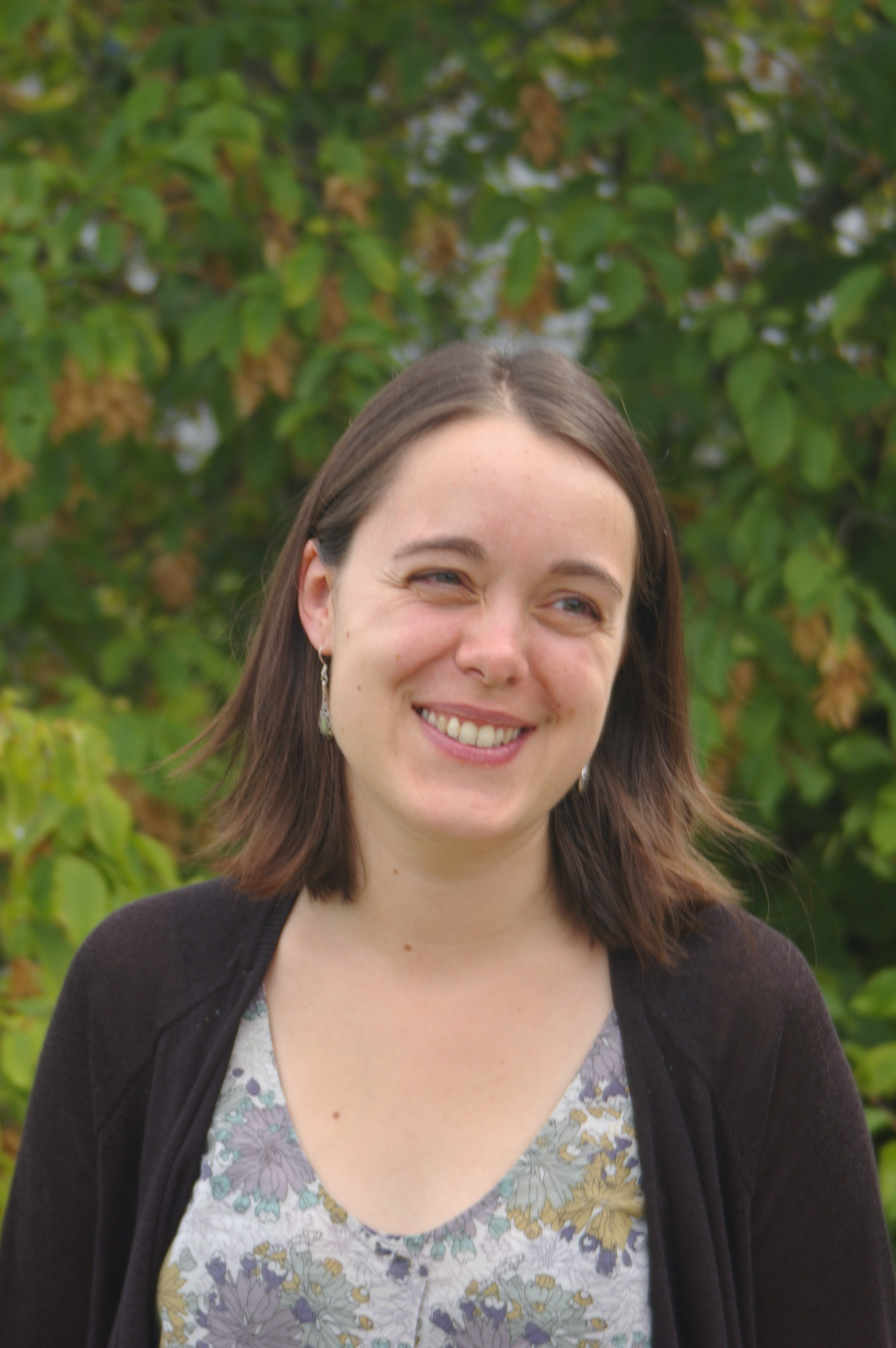 Ana Sohier, conseillère municipale de Rennes déléguée au patrimoine et à la politique linguistique, élue communautaire à Rennes métropole, membre du bureau politique de l'Union démocratique bretonne.